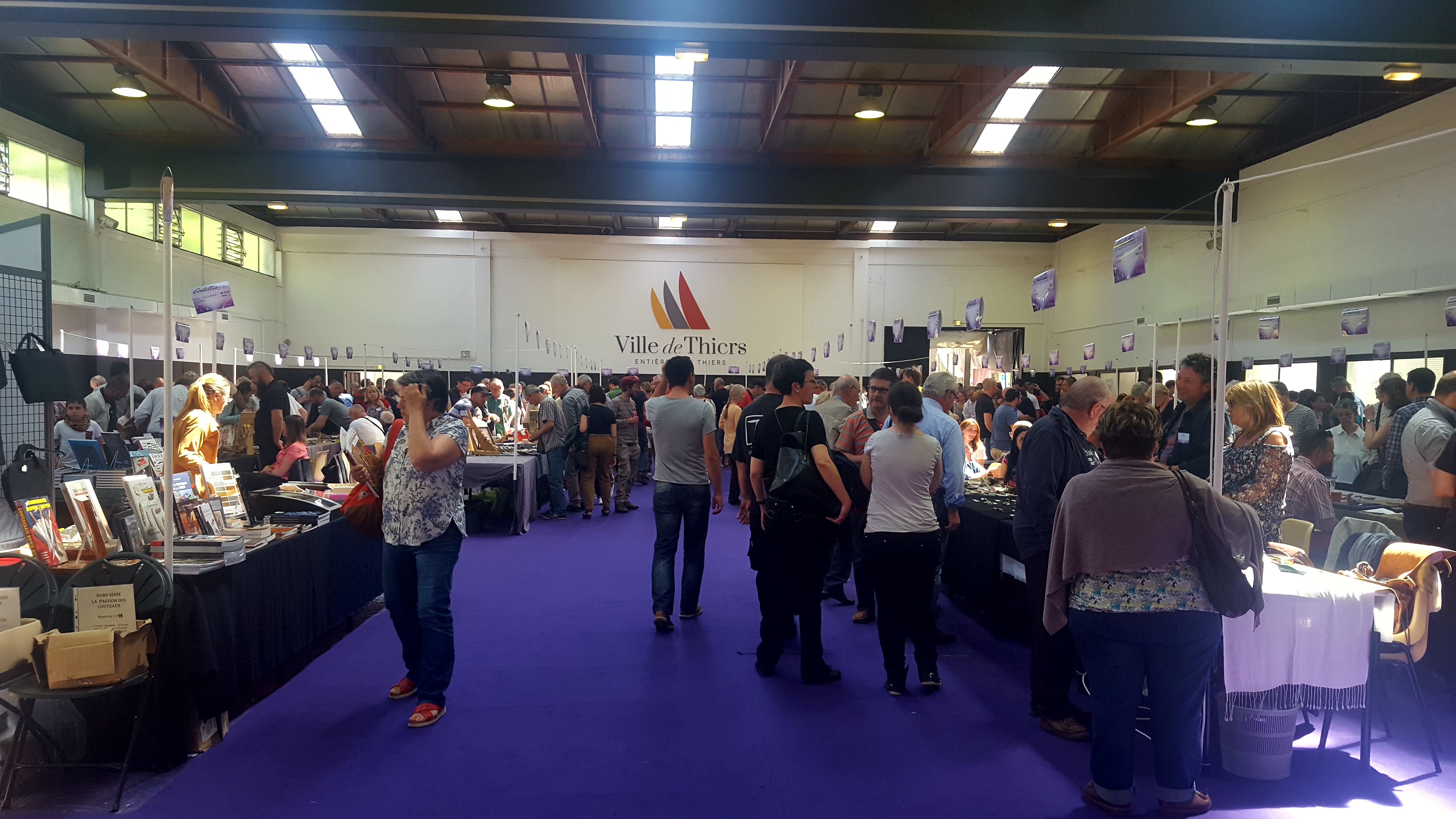 La salle 1 de coutellia 2017 à Thiers 63